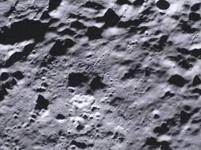 Fotografía tomada por la sonda Ebb de la NASA de la anomalía de Torio de Compton-Belkovich.